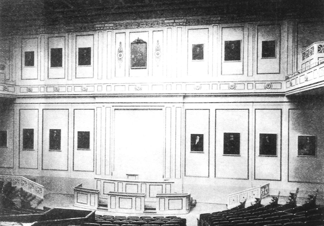 Langenbeck-Virchow-Haus in Berlin/Mitte, Auditorium mit Blick auf den Vorstandstisch